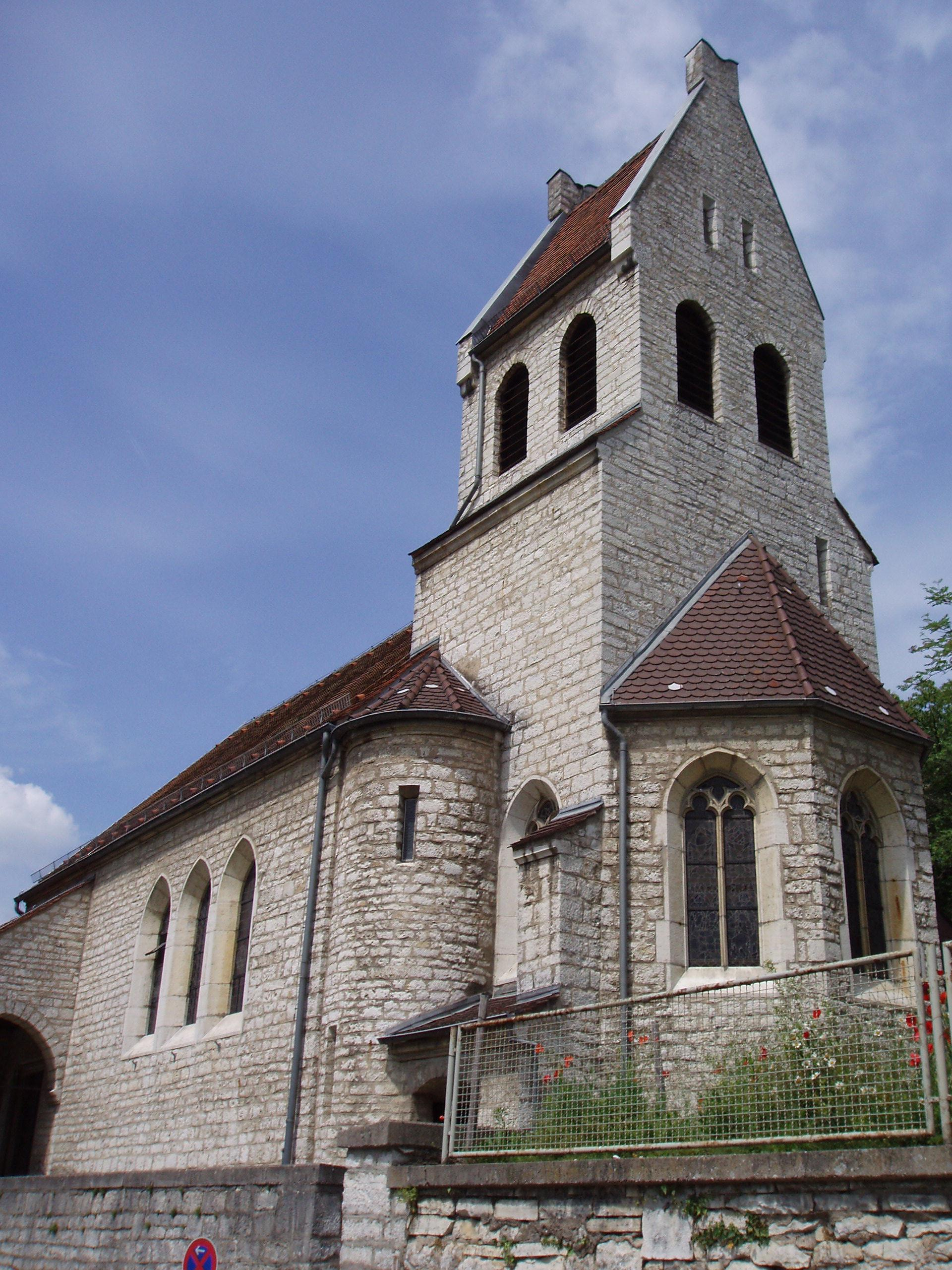 Katholische St. Sola Kirche Solnhofen